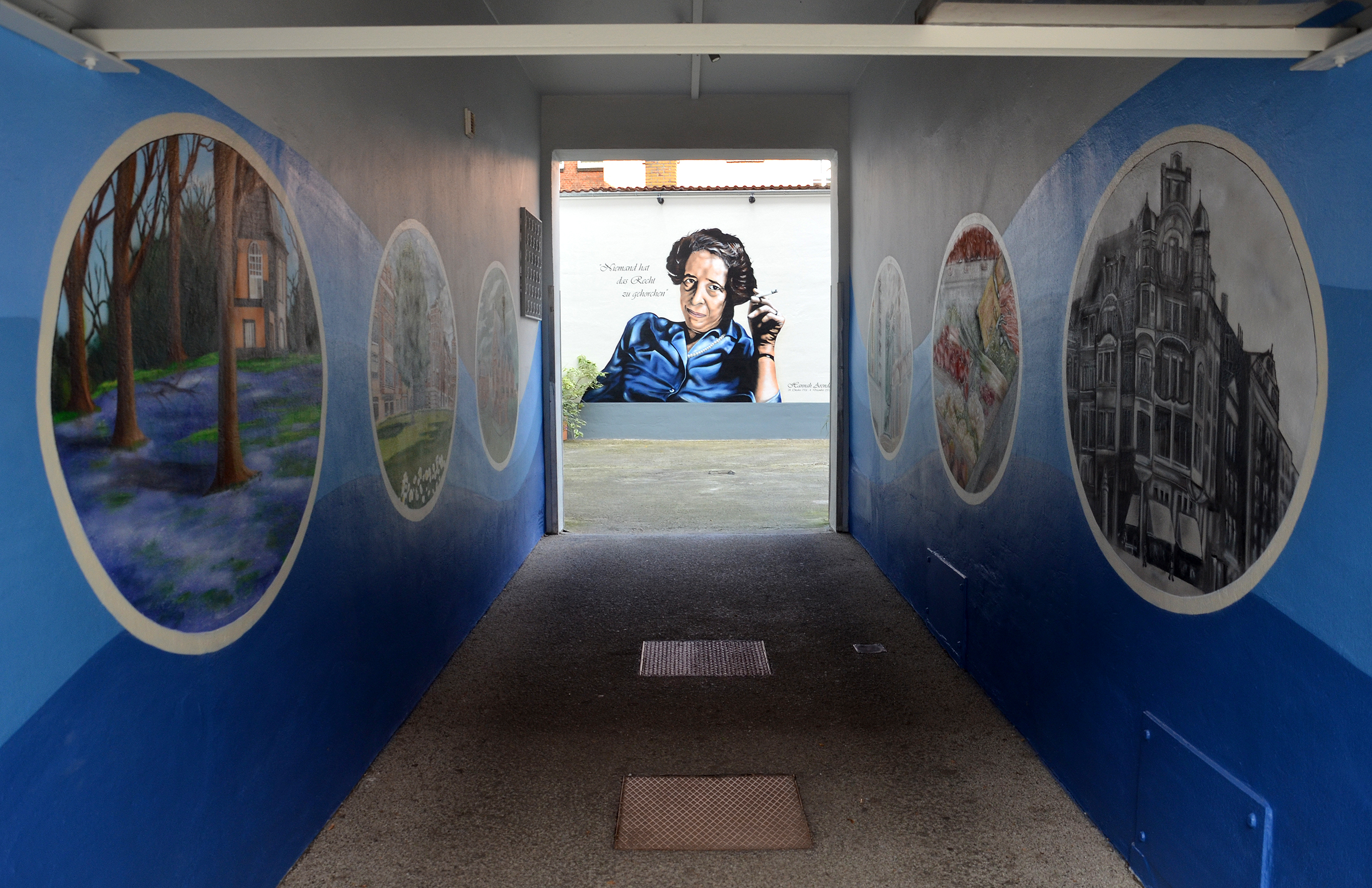 Blick durch die Hofeinfahrt an der Falkenstraße am Geburtshaus der deutsch-jüdischen Historikerin und politischen Philosophin Hannah Arendt am Lindener Marktplatz 2. Die Kunstwerke sind eine im August 2014 fertiggestellte Auftragsarbeit der hannoverschen Graffiti-Künstler Patrik Wolters alias BeneR1 in Teamarbeit mit Kevin Lasner alias koarts ...